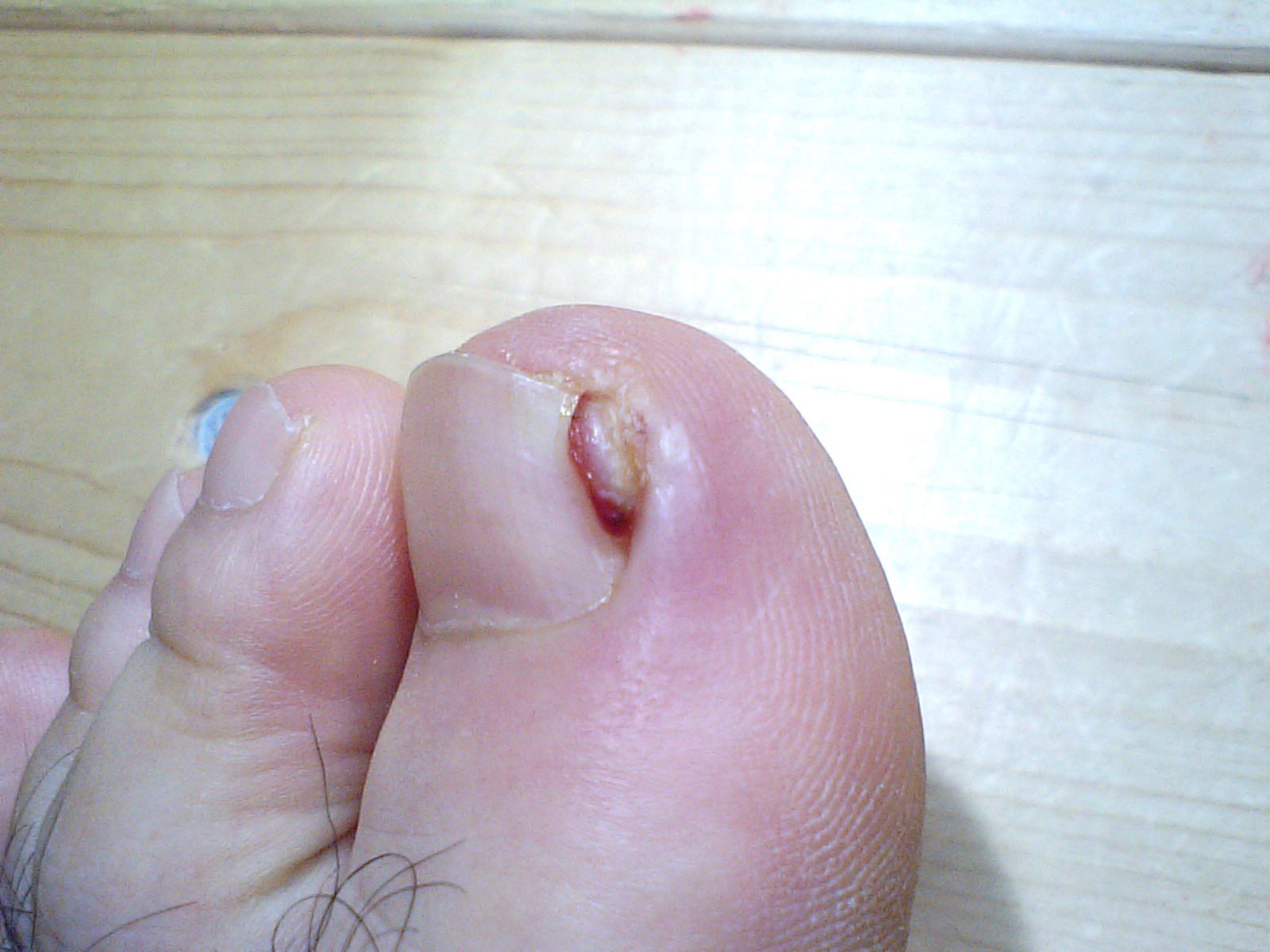 陥入爪による化膿性肉芽腫を側面から撮影。